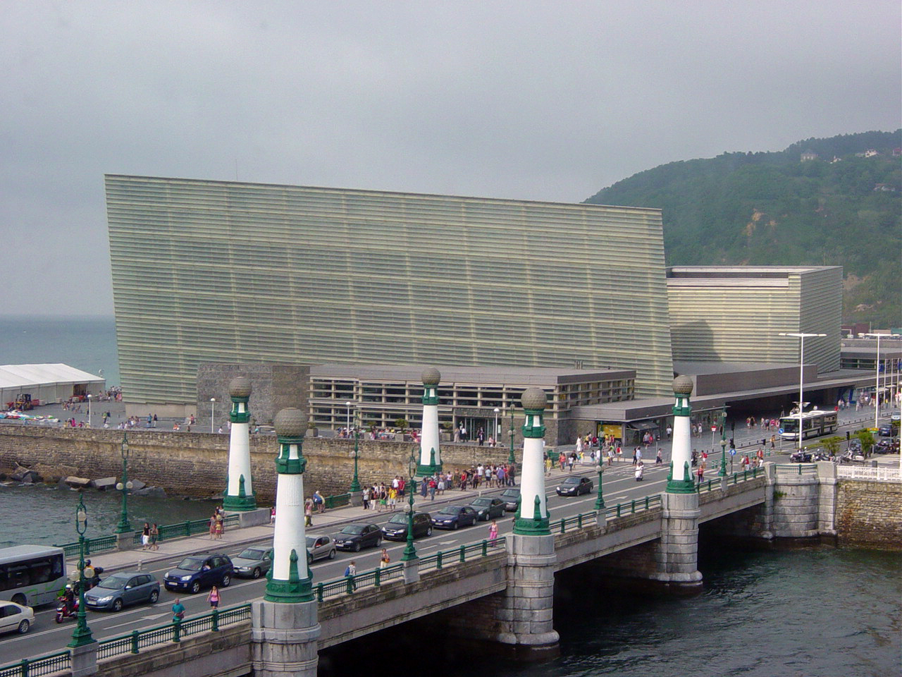 Palacio Kursaal / Kursaal Jauregia / Kursaal Palace / Palais Kursaal